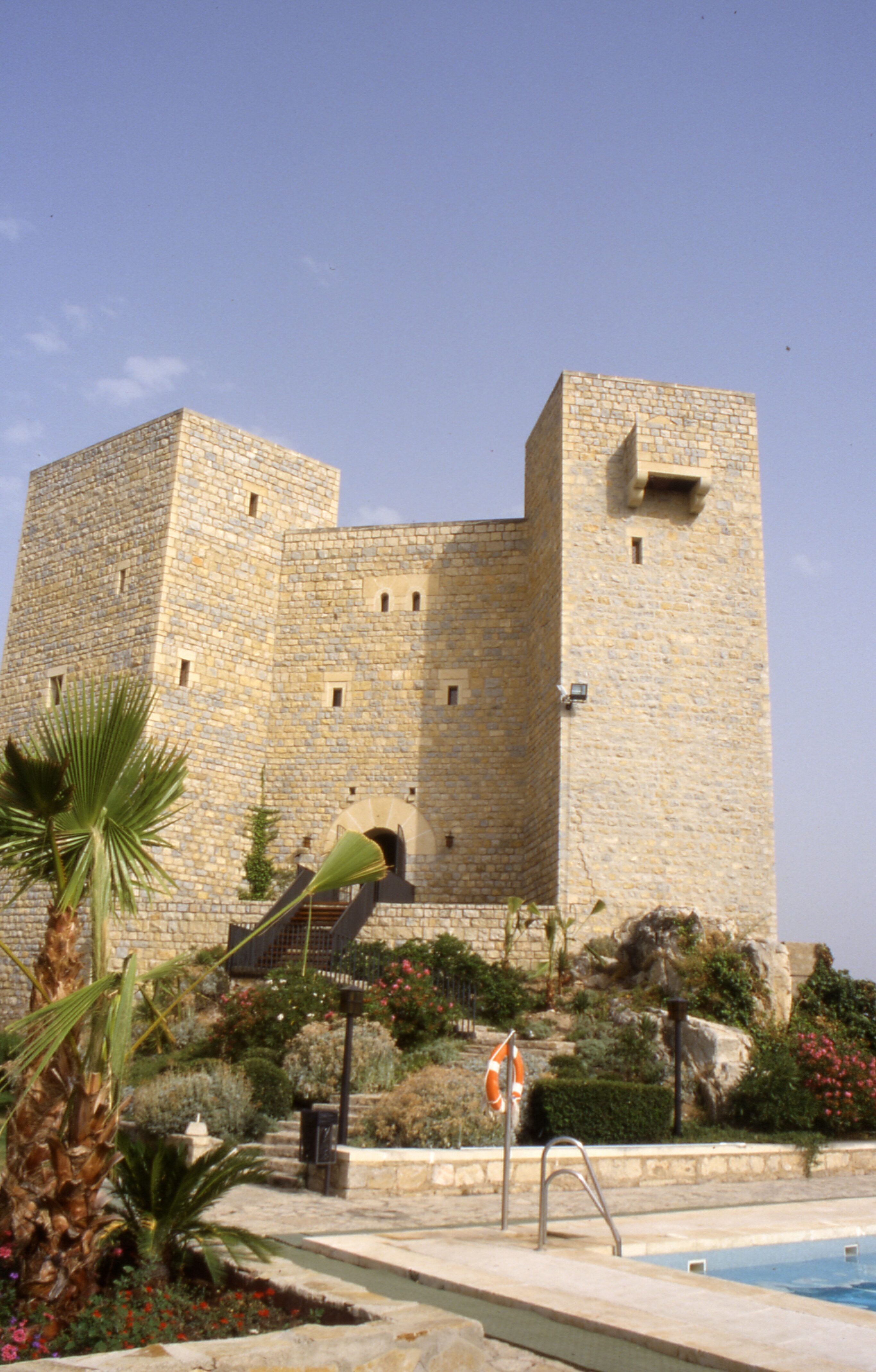 ParadorDeJaen